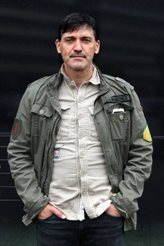 Felice Mazzu.